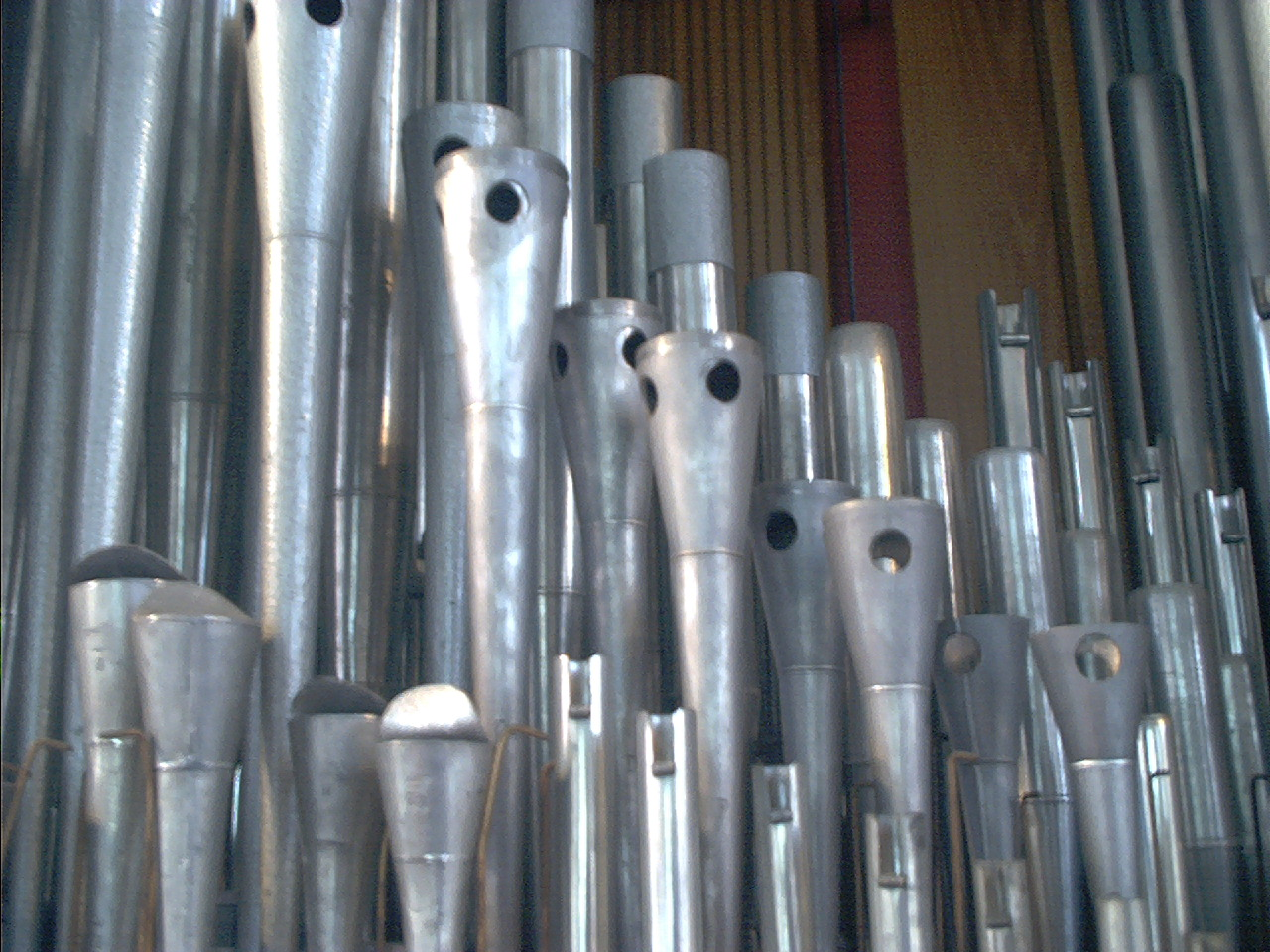 Orgelpfeifen